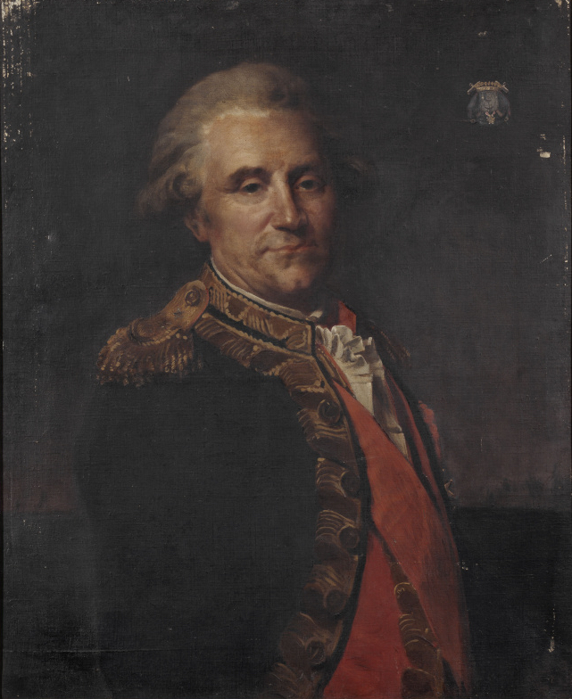 L'amiral Antoine-Jean-Marie Thévenard (1733-1815)